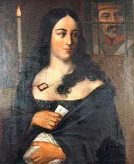 "La Pola en capilla" watercolor on canvas 80 x 70 cm